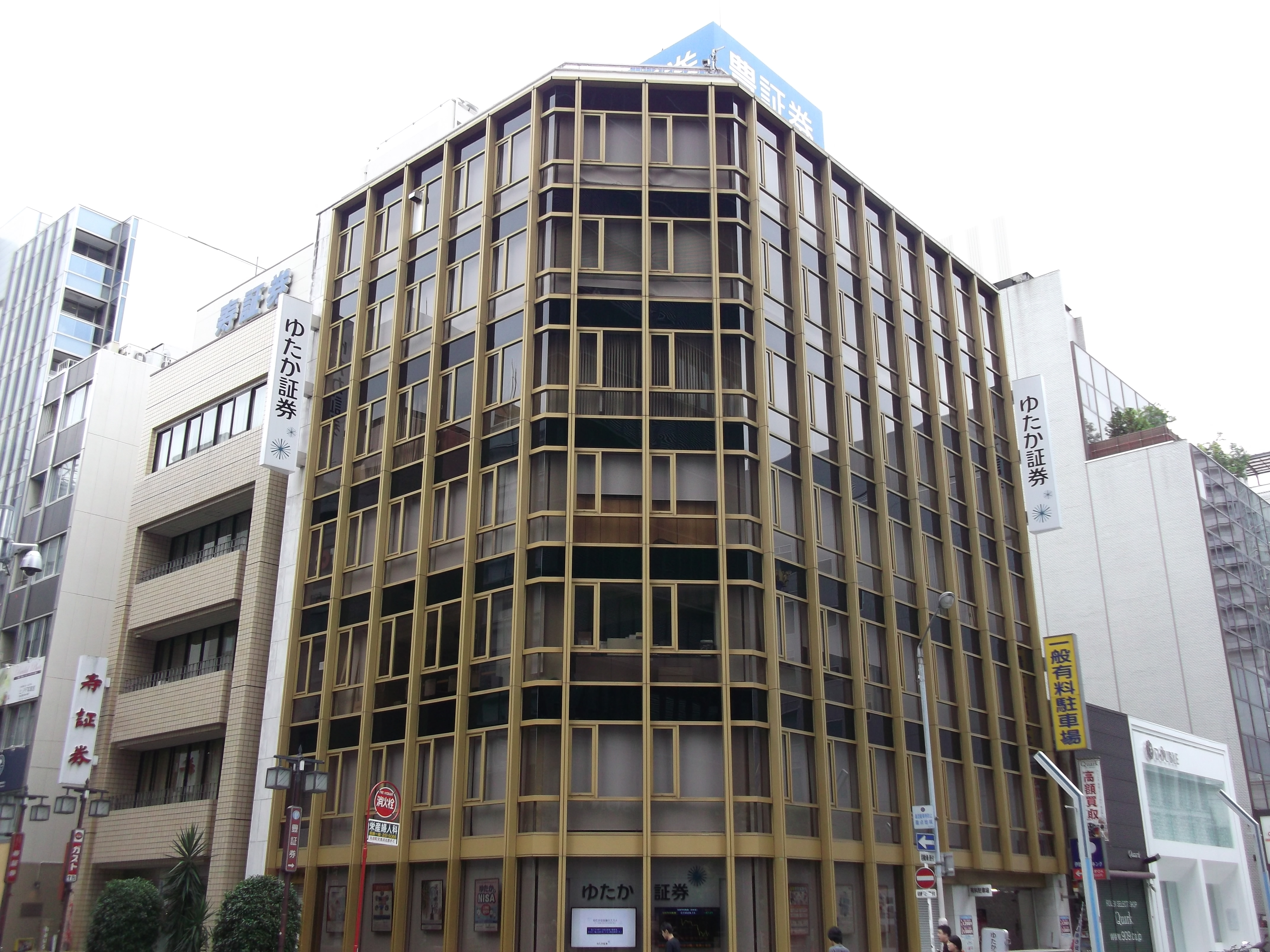 名古屋市中区栄の豊証券本社を西側公道北側より撮影